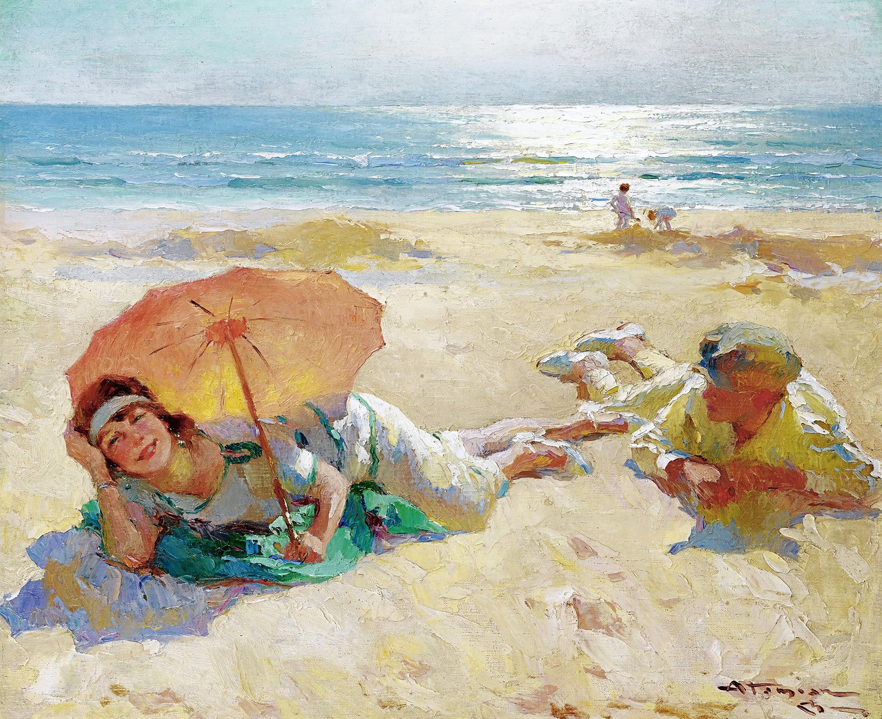 картины художника Шарля (Гарабед) Атамяна (1872—1947).